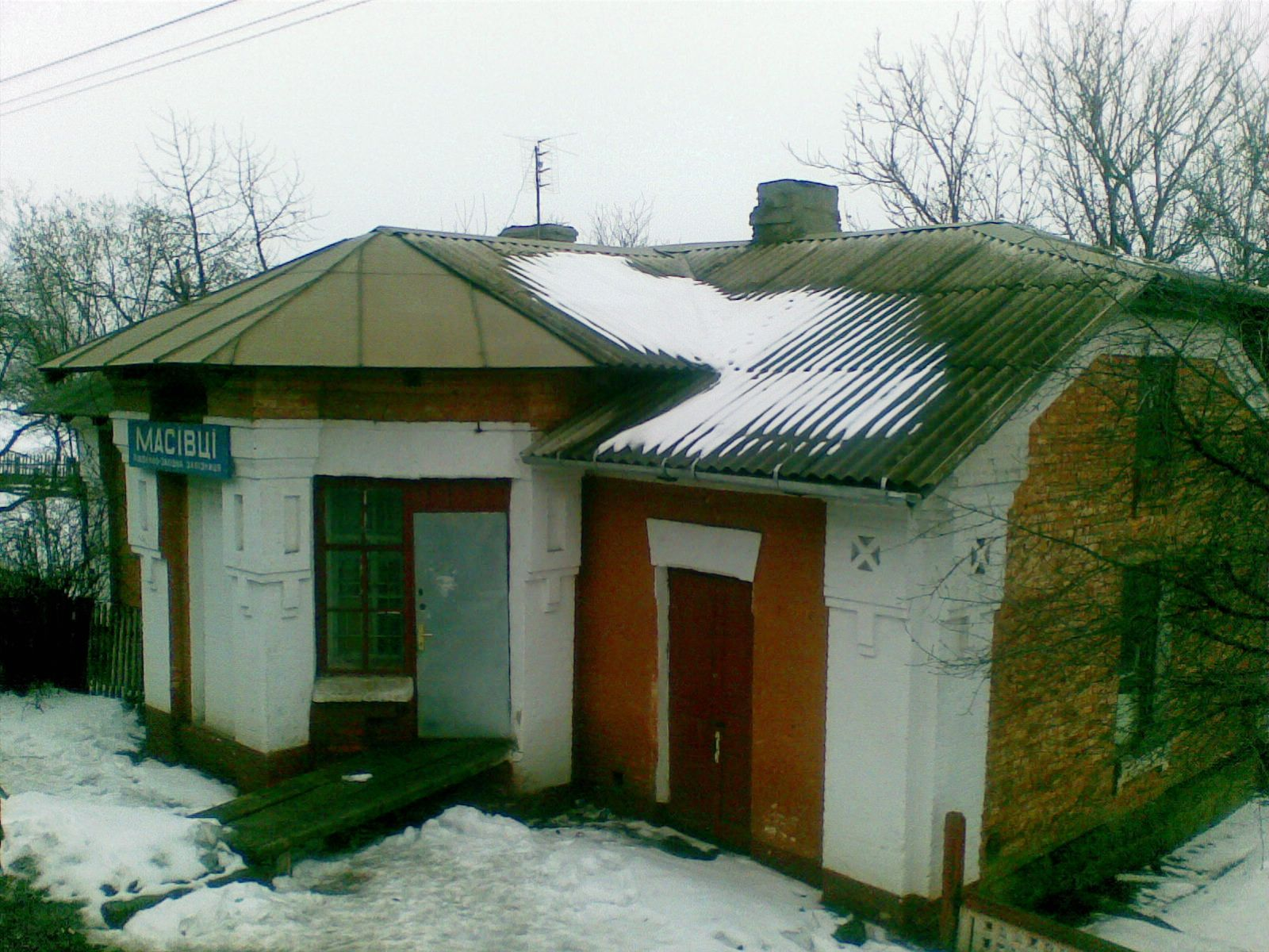 Масівці (вокзал): Вокзал на станції Масівці Південно-Західної залізниці